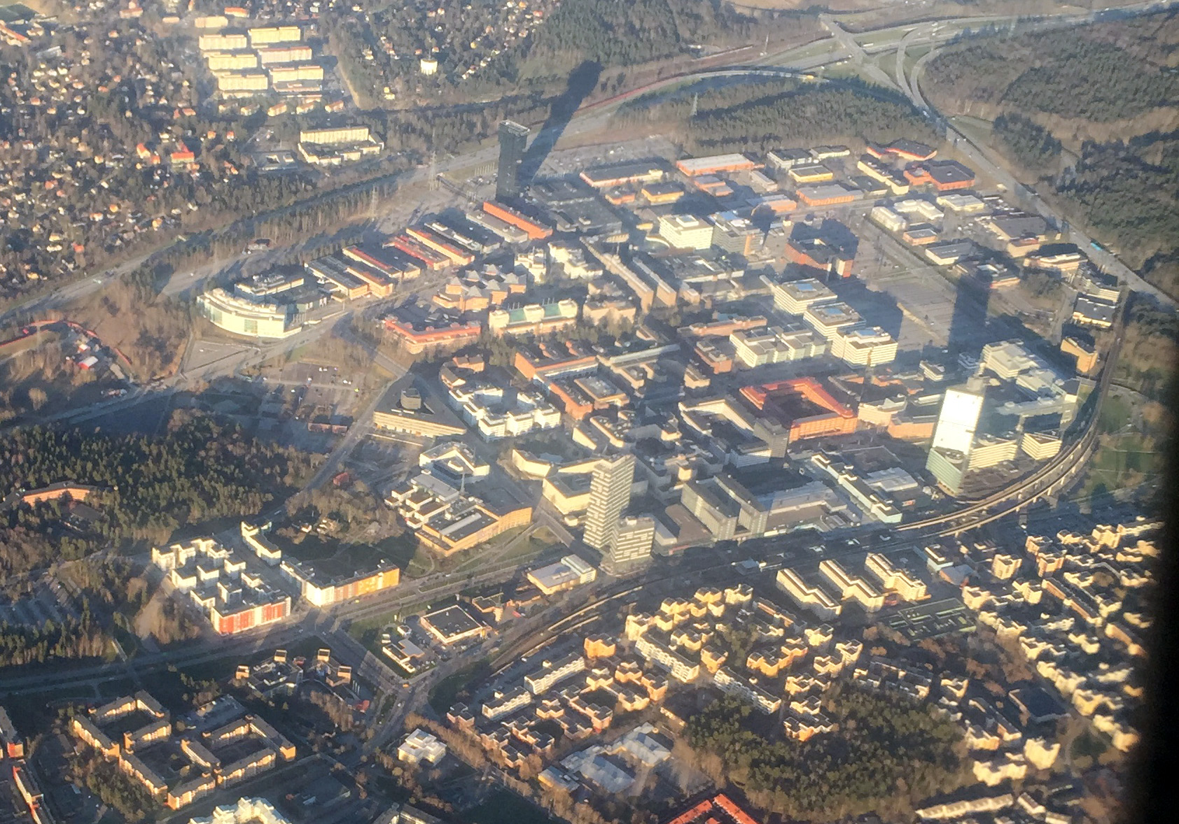 Kista, flygfoto